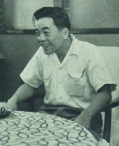 平古場昭二